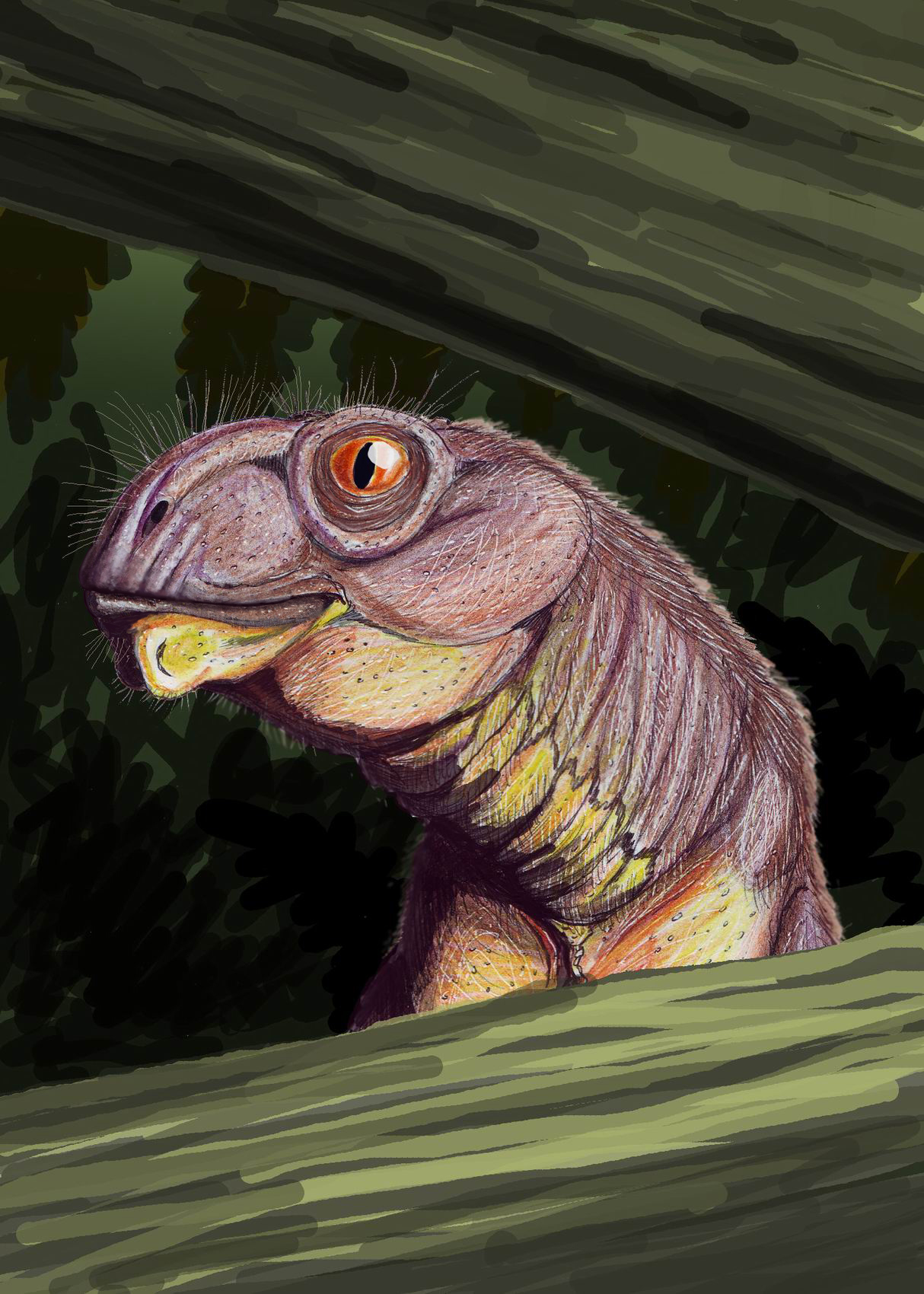 Otsheria netsvetaevi